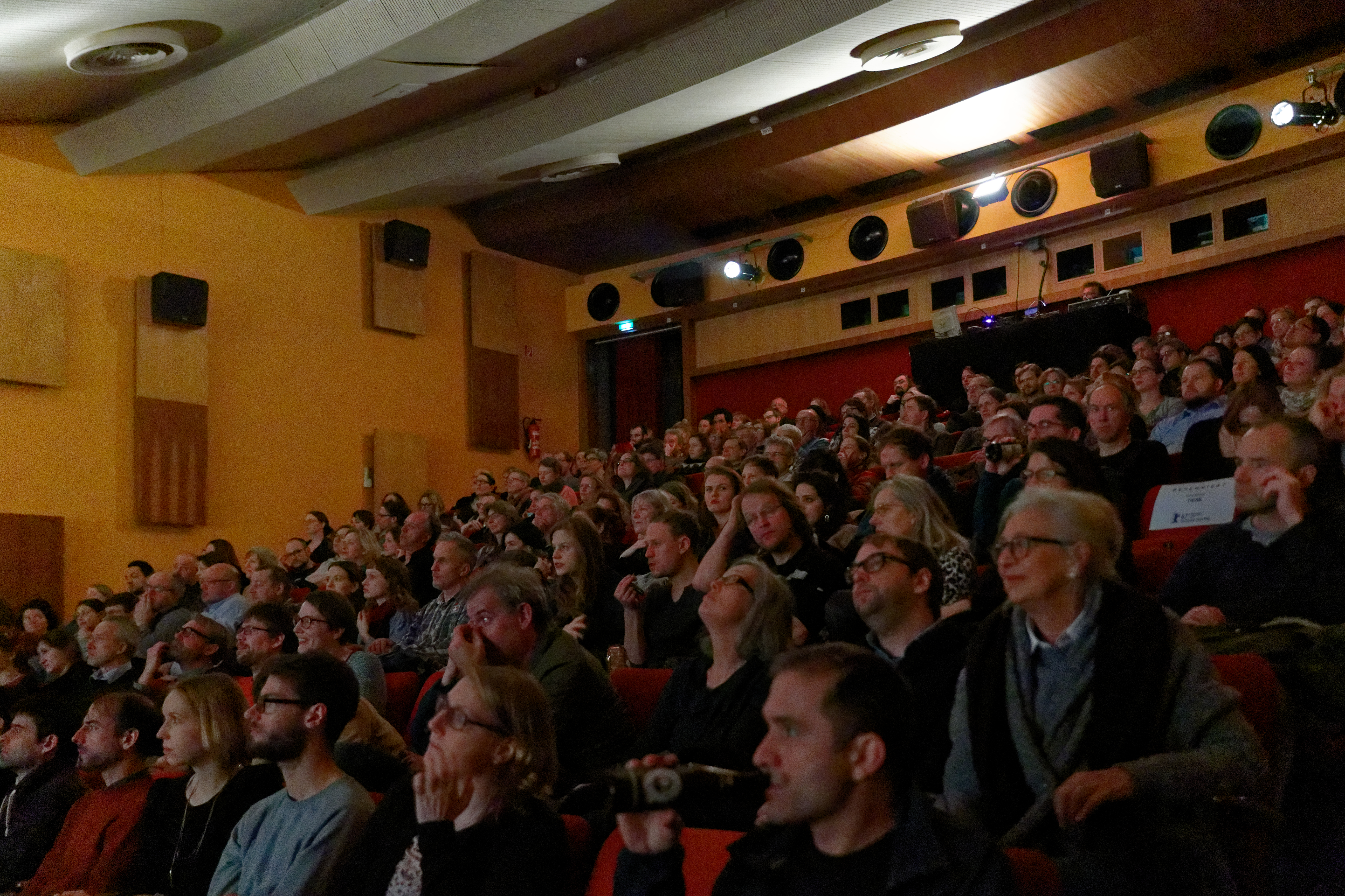 Premiere des Films Tiere (Animals) von Greg Zglinski im Rahmen der Sektion Forum der Berlinale 2017